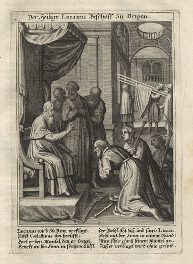 "Der heilige Lucanus Bischoff zu Brixen." (Lukan von Säben, Sankt Lucanus) Entwurf: Peter Candid oder Matthaeus Kager. Ausführung: Raphael Sadeler der Älteren oder Raphael Sadeler der Jüngere.